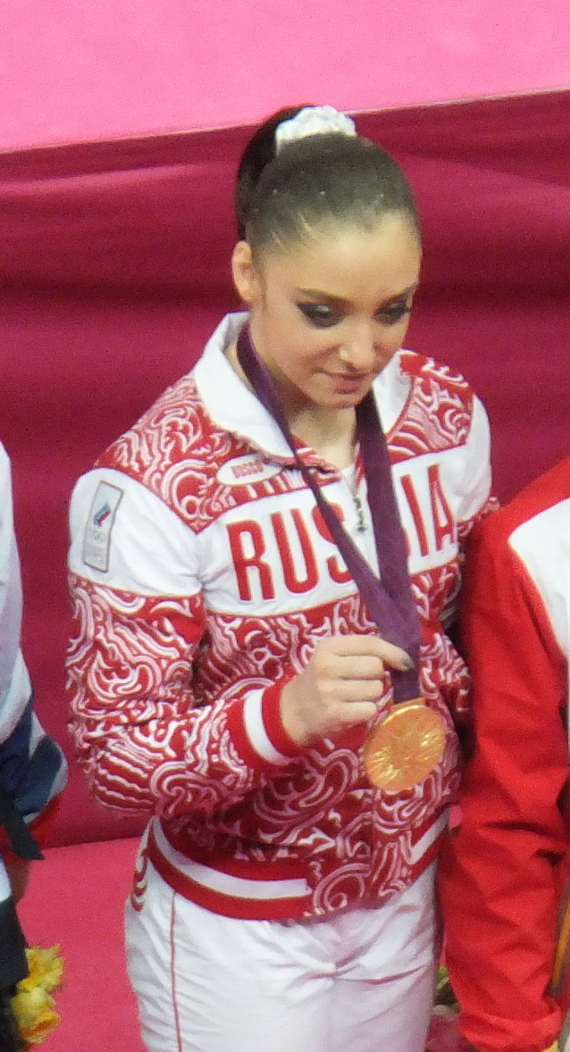 Aliya Mustafina